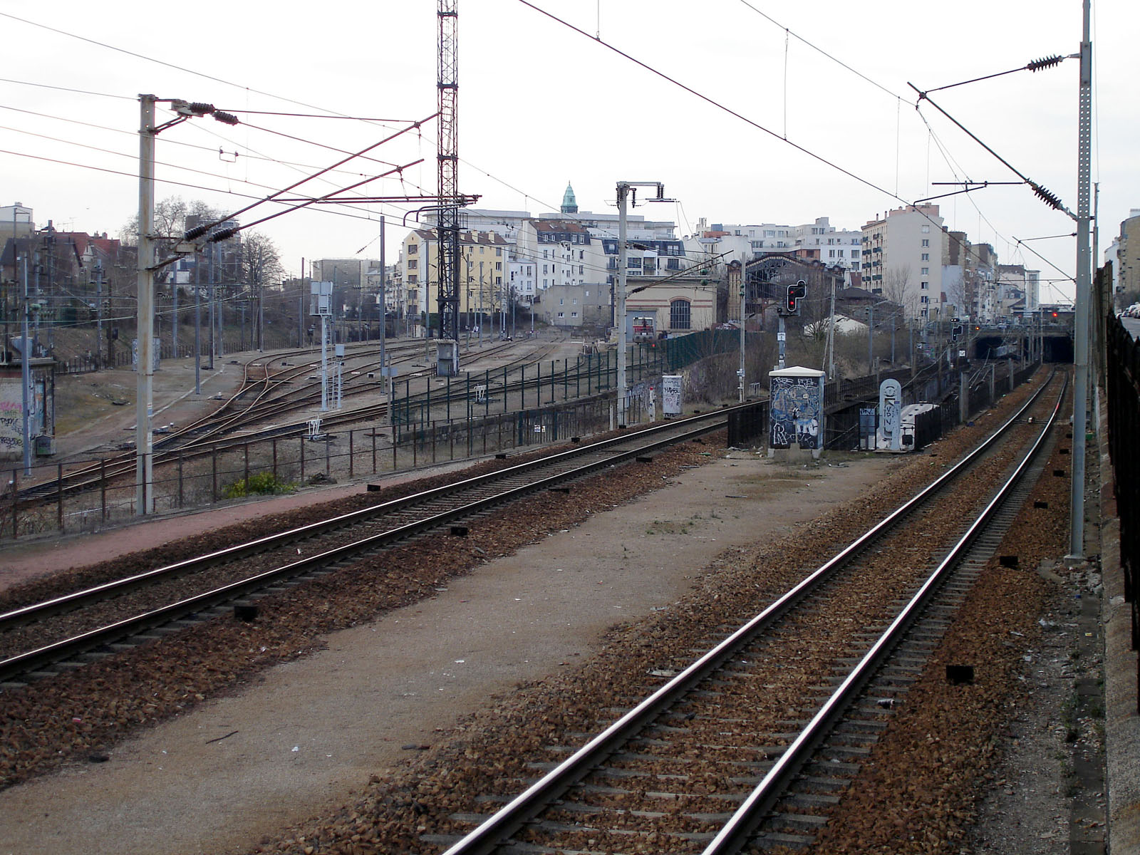 La gare des Carbonnets, ancienne gare électrique de Bois-Colombes de 1924 à 1936, à Asnières-sur-Seine, Hauts-de-Seine, France.